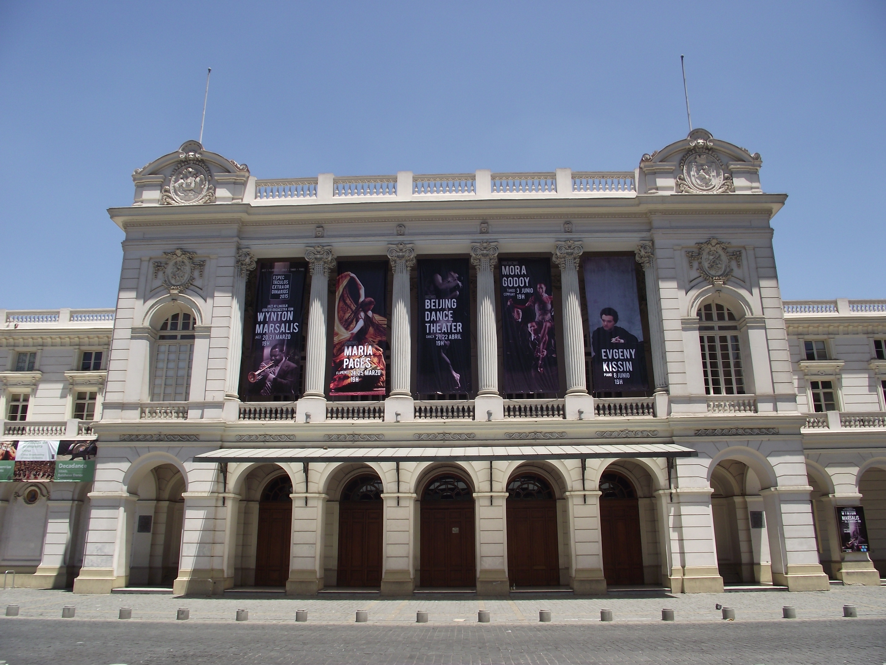 Fachada del Teatro Municipal de Santiago de Chile